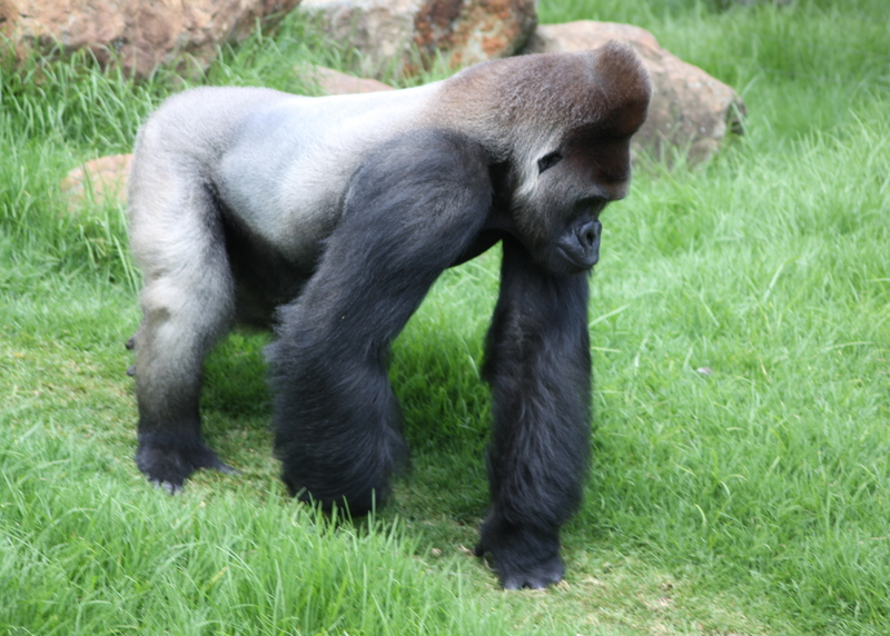 Silverback gorilla